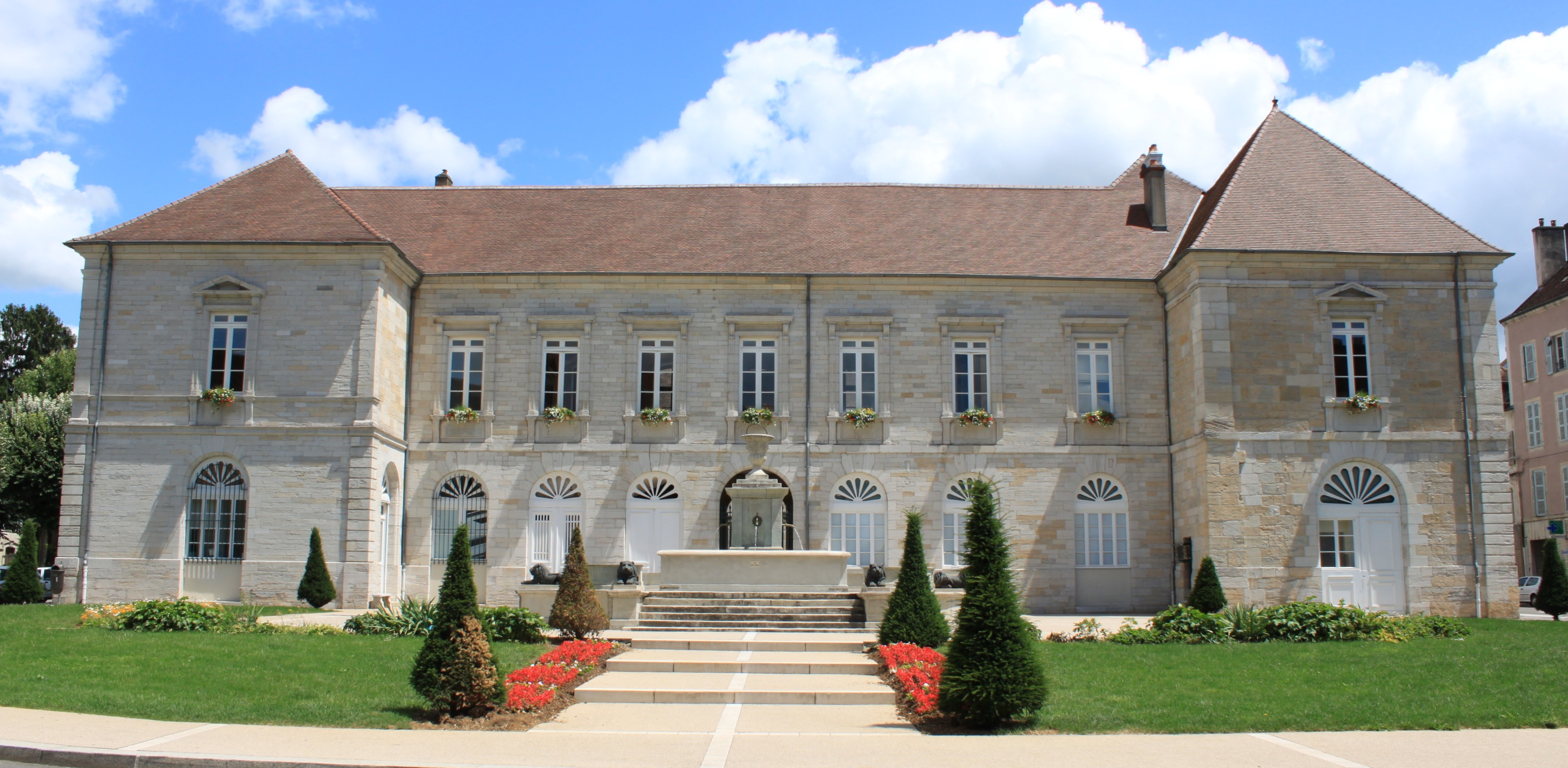 Lons-le-Saunier, Franche-Comté, France